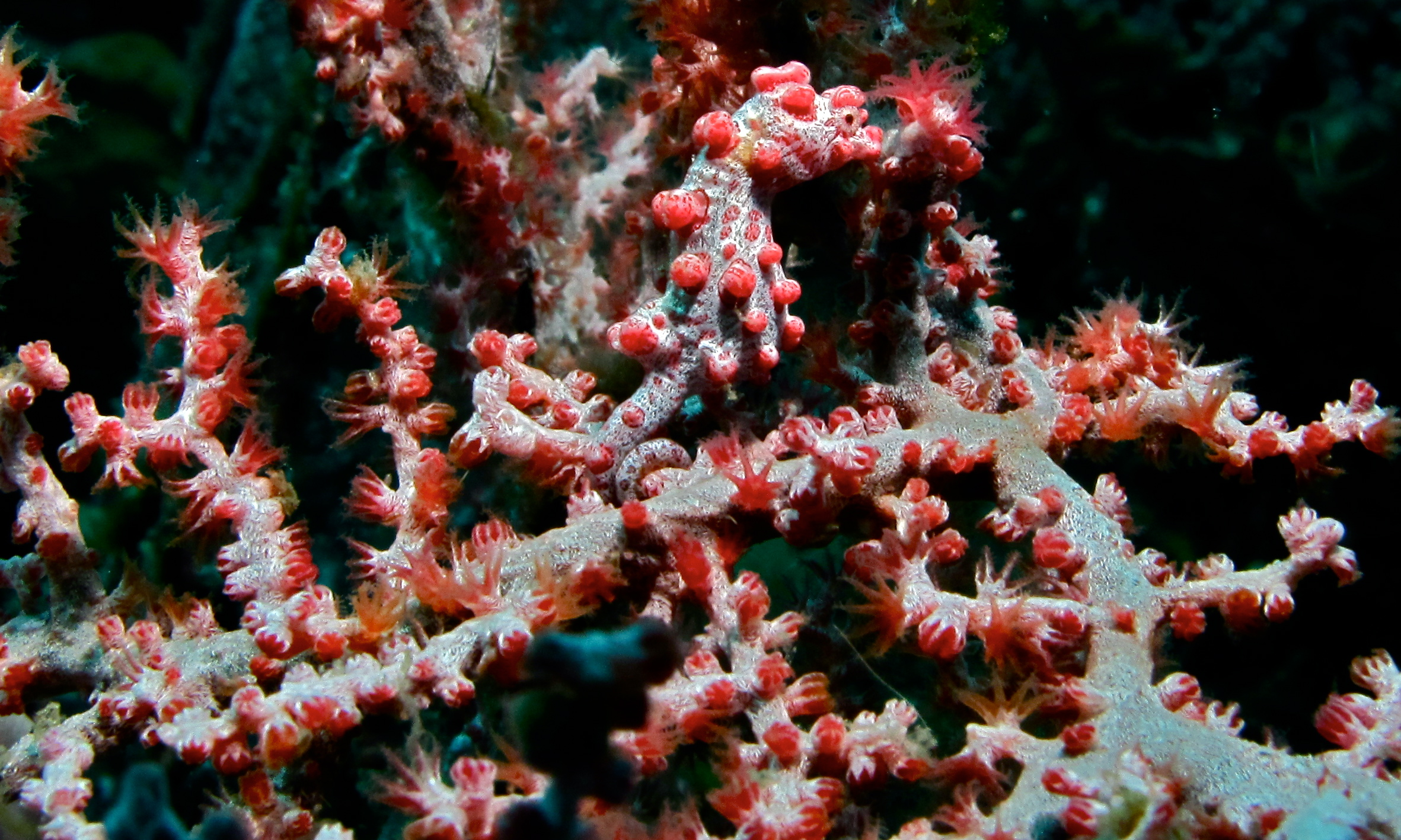 Nudi Retreat II, Lembeh Strait, Sulawesi, INDONESIA